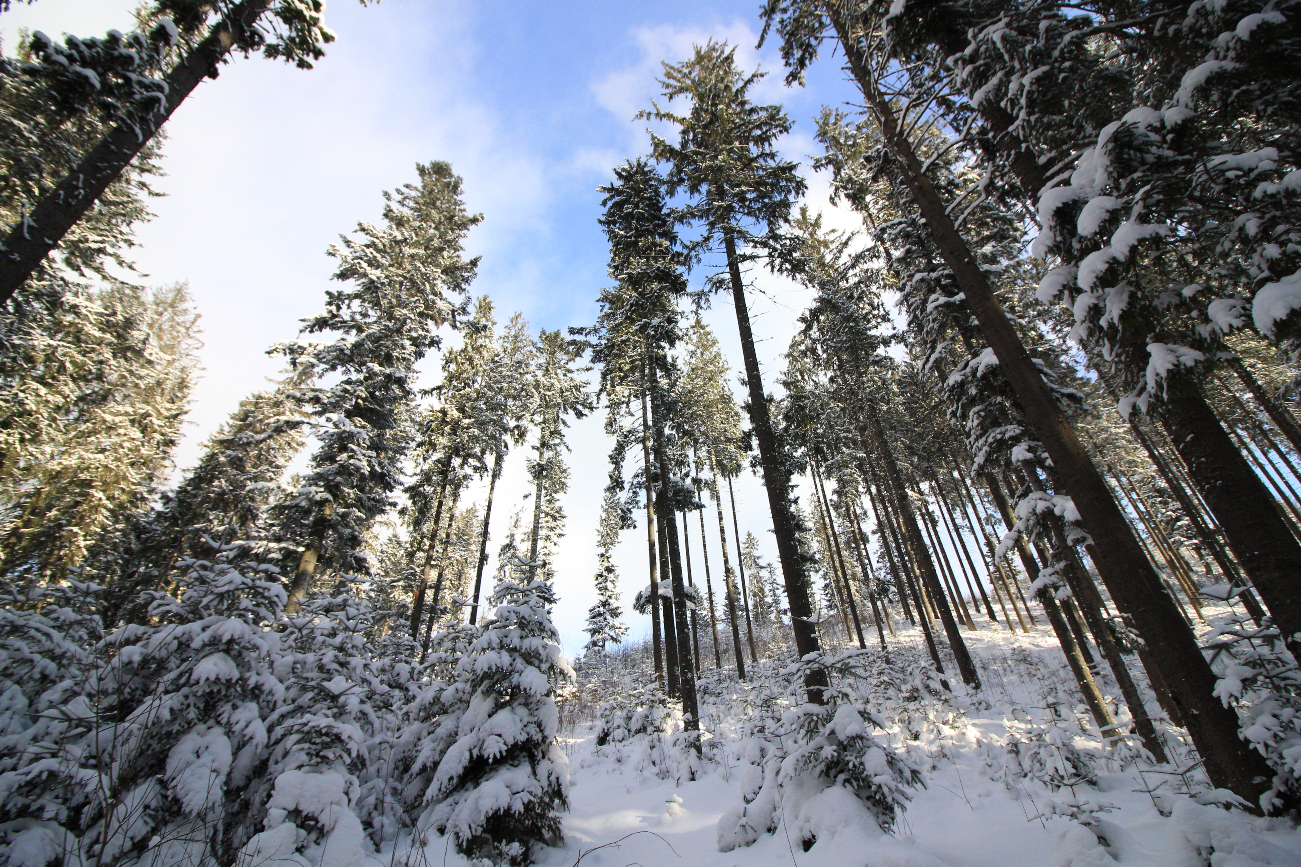 Tatra Gebirge, Wald bei Schnee